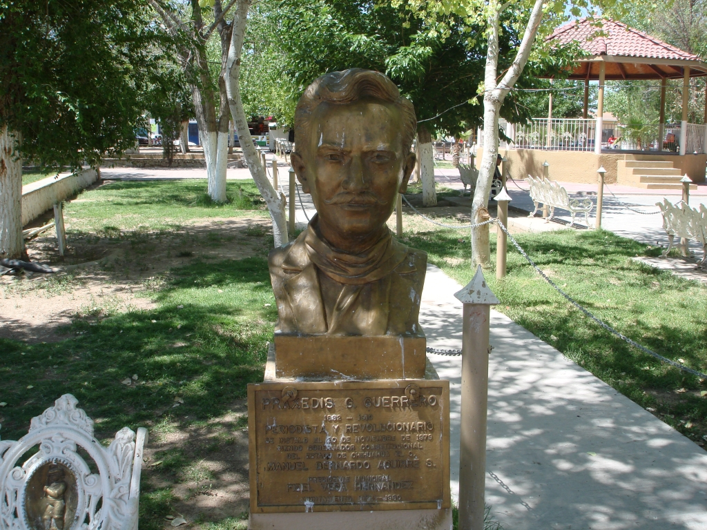 Busto de Práxedis G. Guerrero en el municipio Práxedis G. Guerrero, Chihuahua, México.